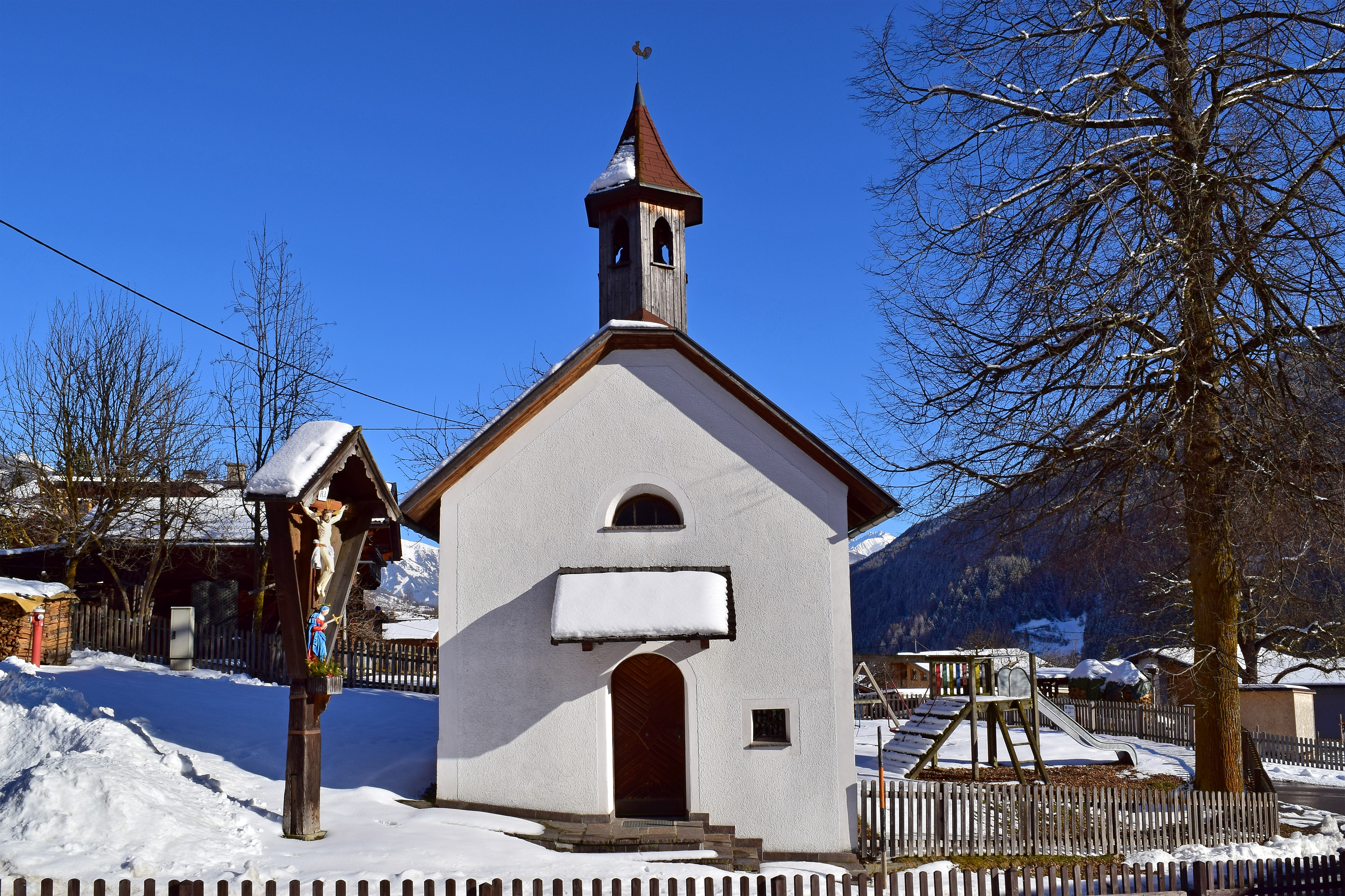 Die Kapelle hl. Apollonia in Niedermauern wurde 1783 erbaut.